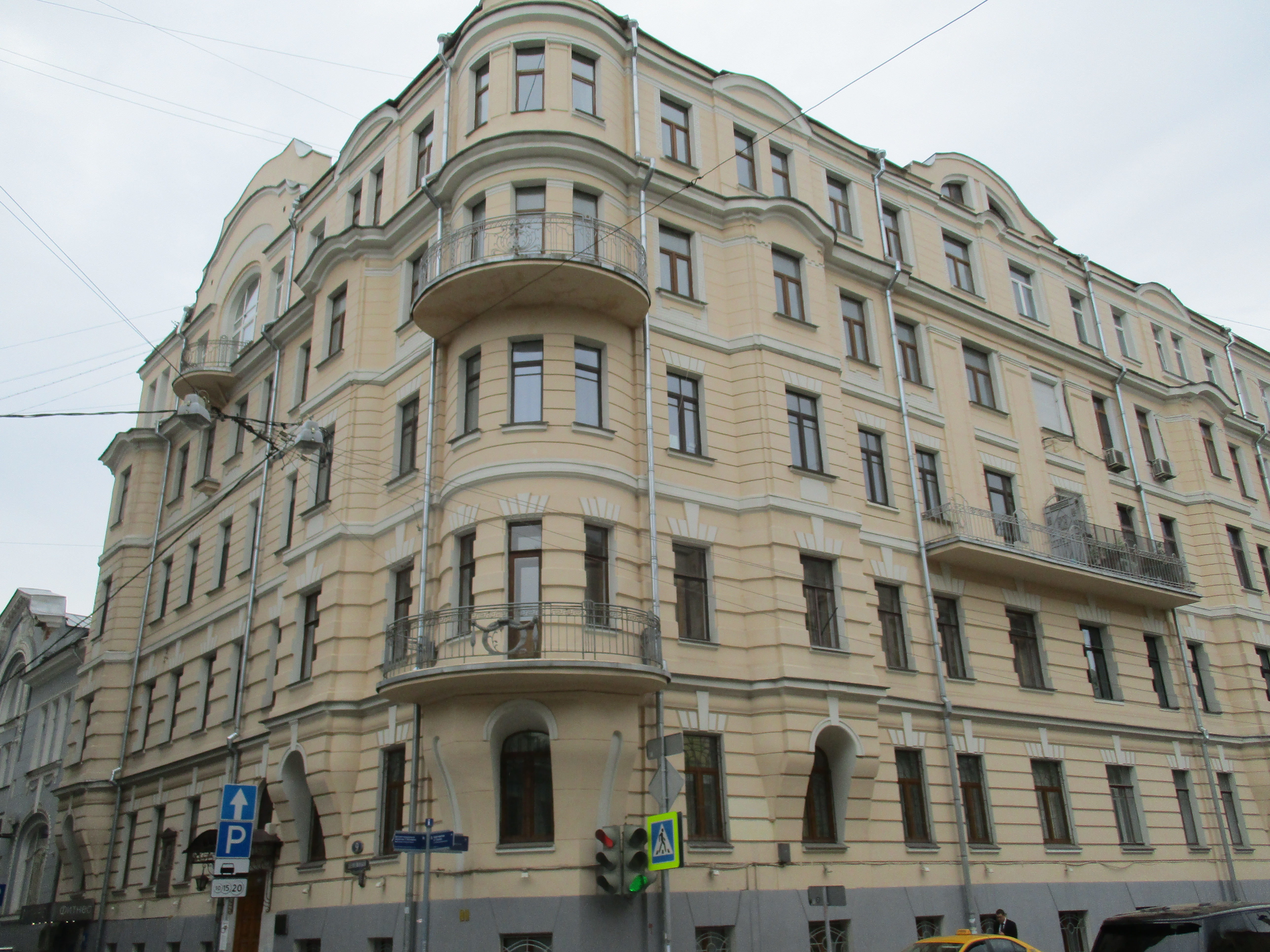 Дом, в котором в 1923-1933 гг. жил советский государственный и общественный деятель Луначарский Анатолий Васильевич. В квартире мемориальный музей А.В.Луначарского: Глазовский пер., дом 5, Хамовники, Центральный округ, Москва